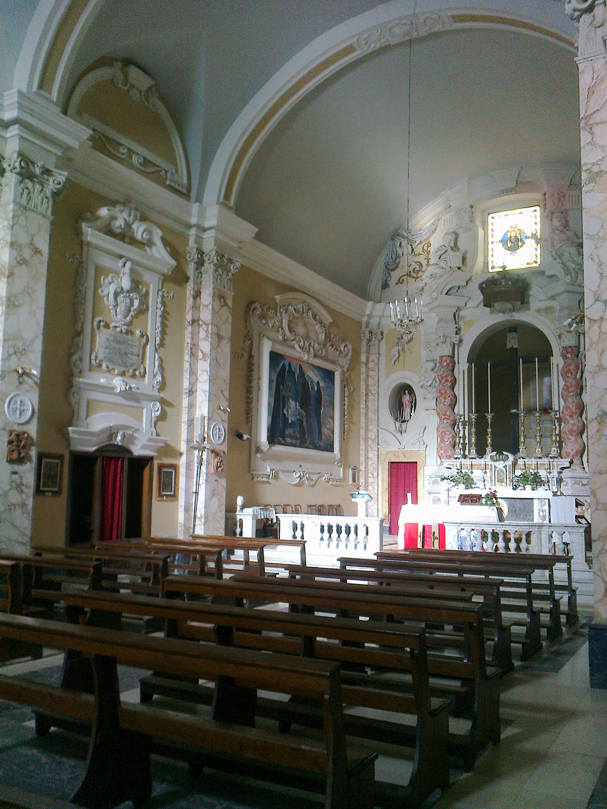 Livorno, Valle Benedetta: chiesa di S. Giovanni Gualberto.